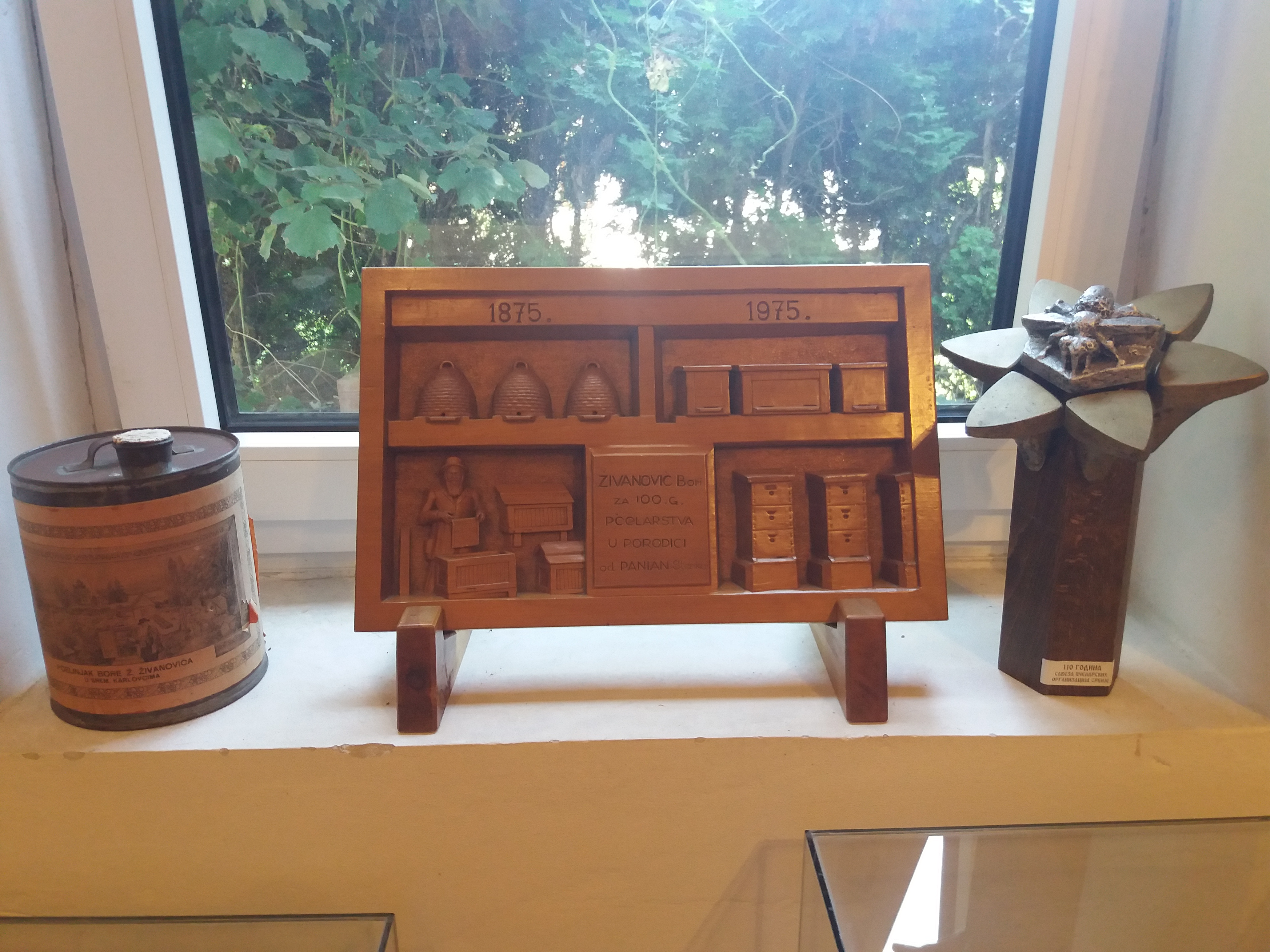 Srpski (latinica): Muzej pčelarstva, Sremski Karlovci